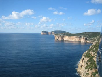 Vista aerea di Punta Giglio e Capo caccia Vista aèria de Punta Lliri i Cap de la Caça